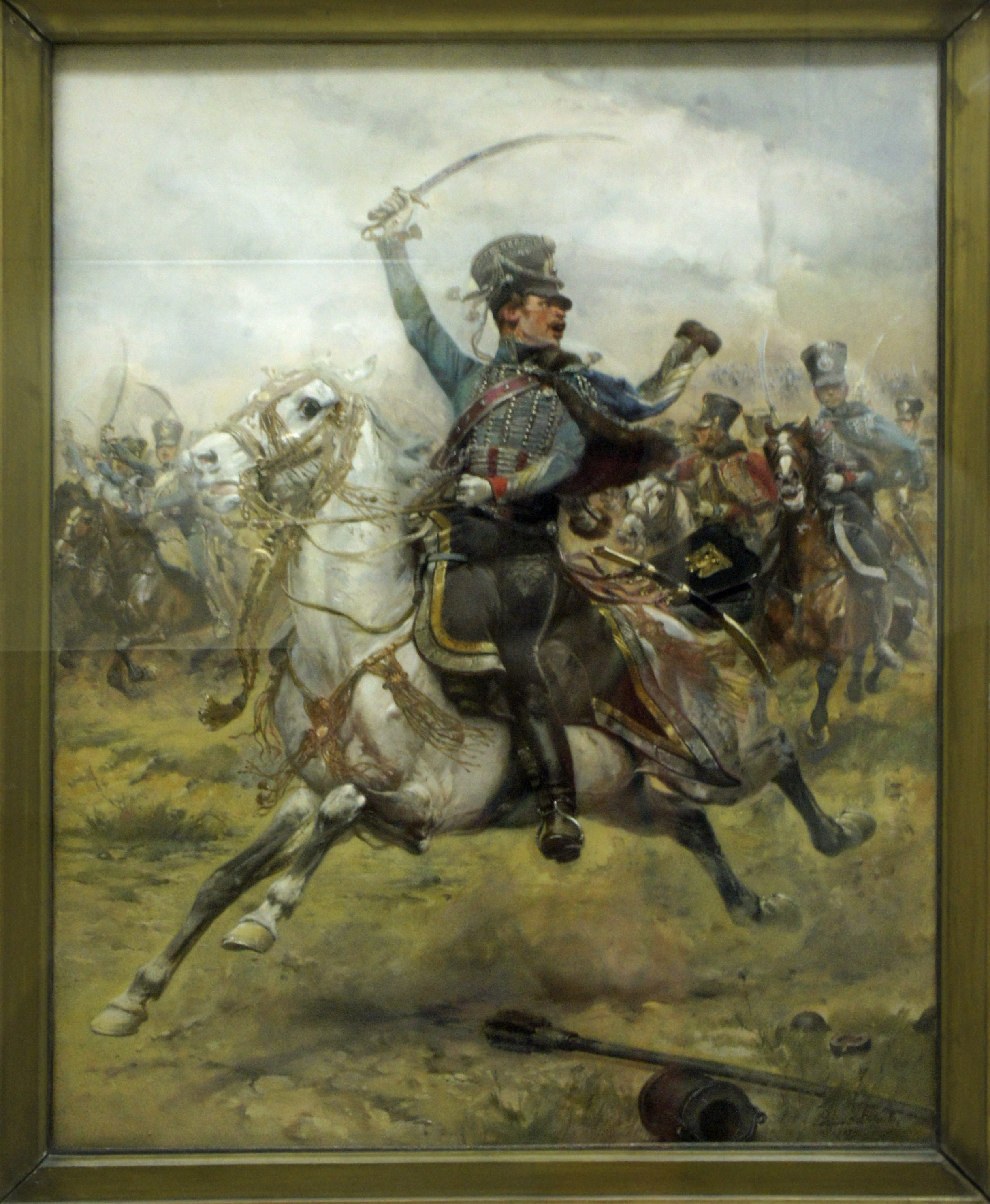 La_charge par Edouard Detaille.